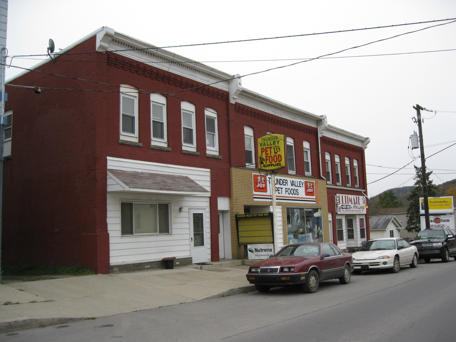 Hallstead, Pennsylvania